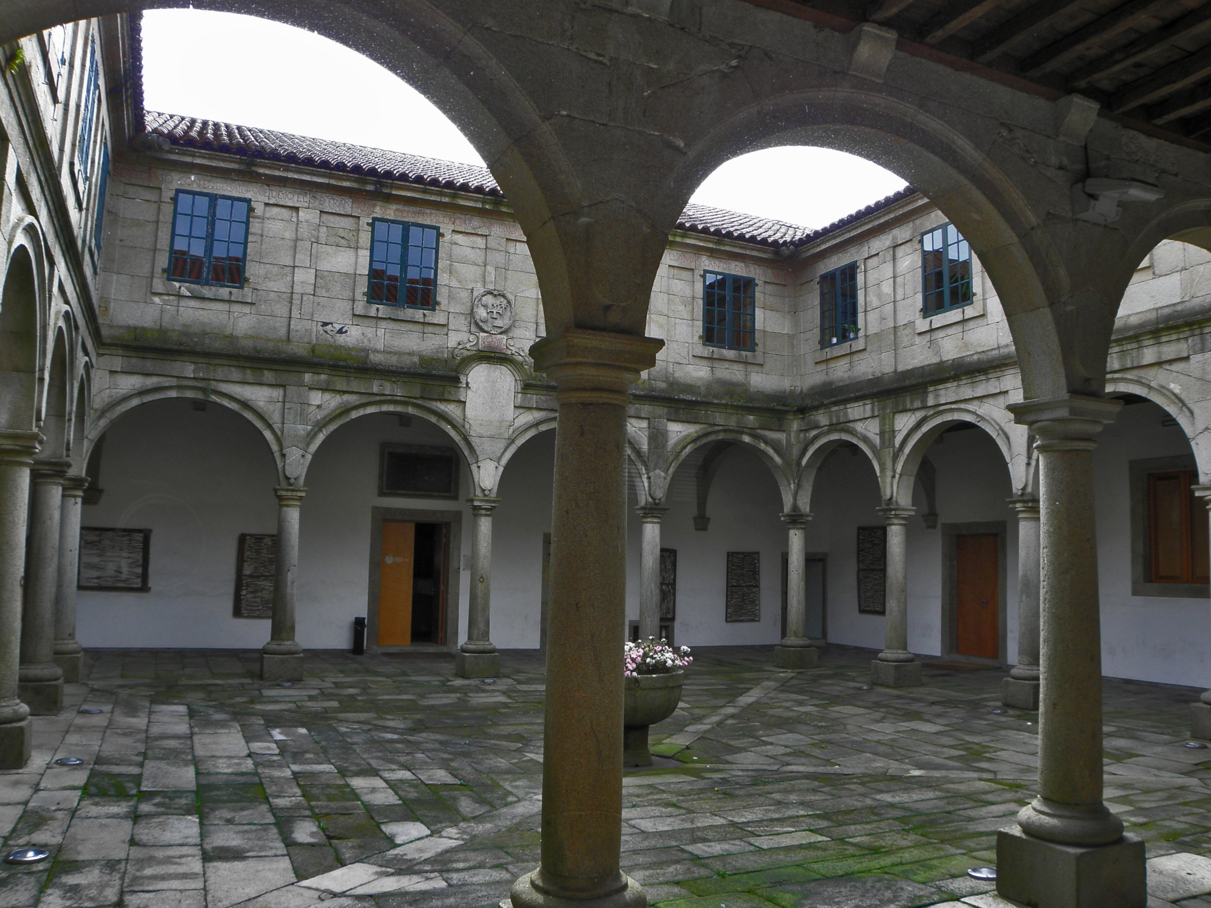 Esta foto participó En otro lugar de flickr